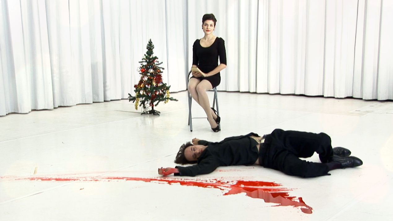 הוידאודאנס פנים. בר שיצרה וביימה עמנואלה עמיחי